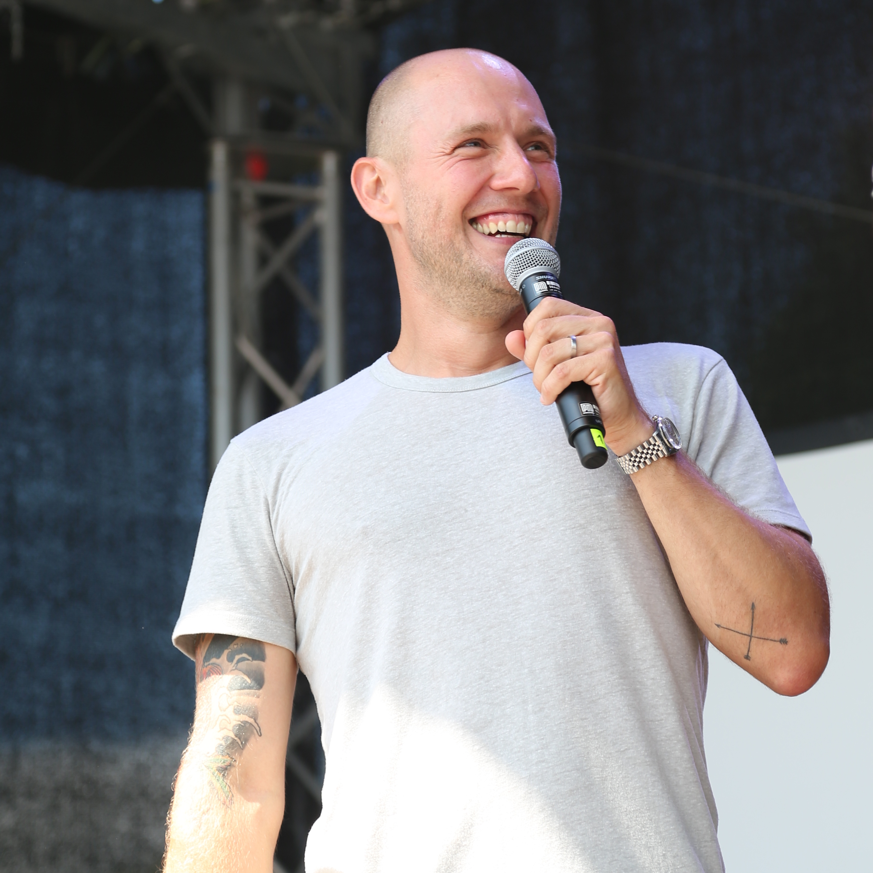 Oli Petszokat beim "Rote Rosen"-Fantag 2017, am 18.06.2017 in Lüneburg.